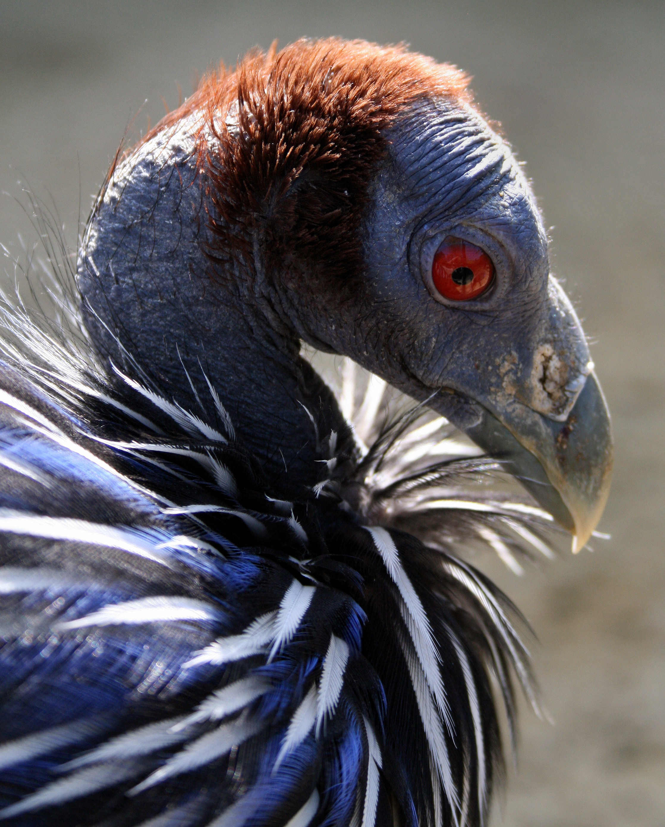 Sujet:Geierpärelhong Source:Foto vum Benutzer:Tsui, dem Manfred Werner